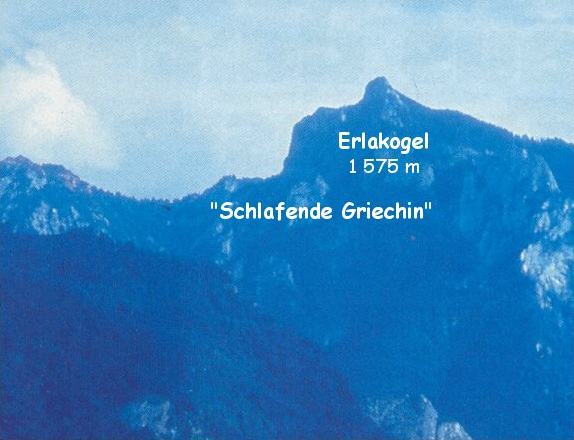 Erlagkogel - Schlafende Griechin